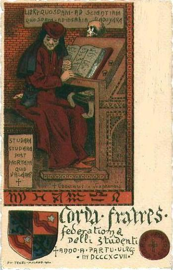 Première carte-postale éditée pour la Corda Fratres. On y lit deux inscriptions latines: "Libri quosdam ad scientiam quosdam ad insaniam deduxere" et "Studere studere, post mortem quid valere?"